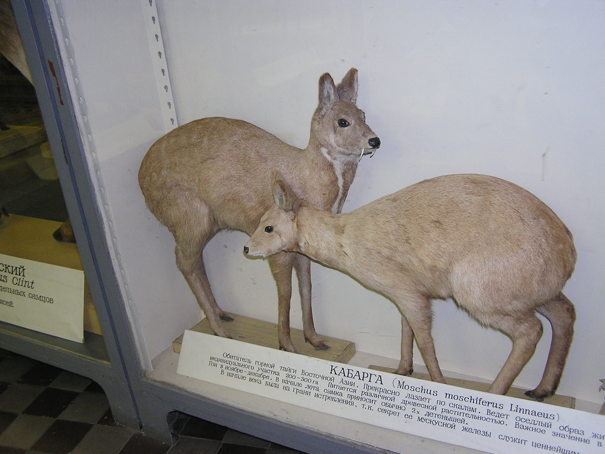 Зоологический музей в Санкт-Петербурге. Кабарга